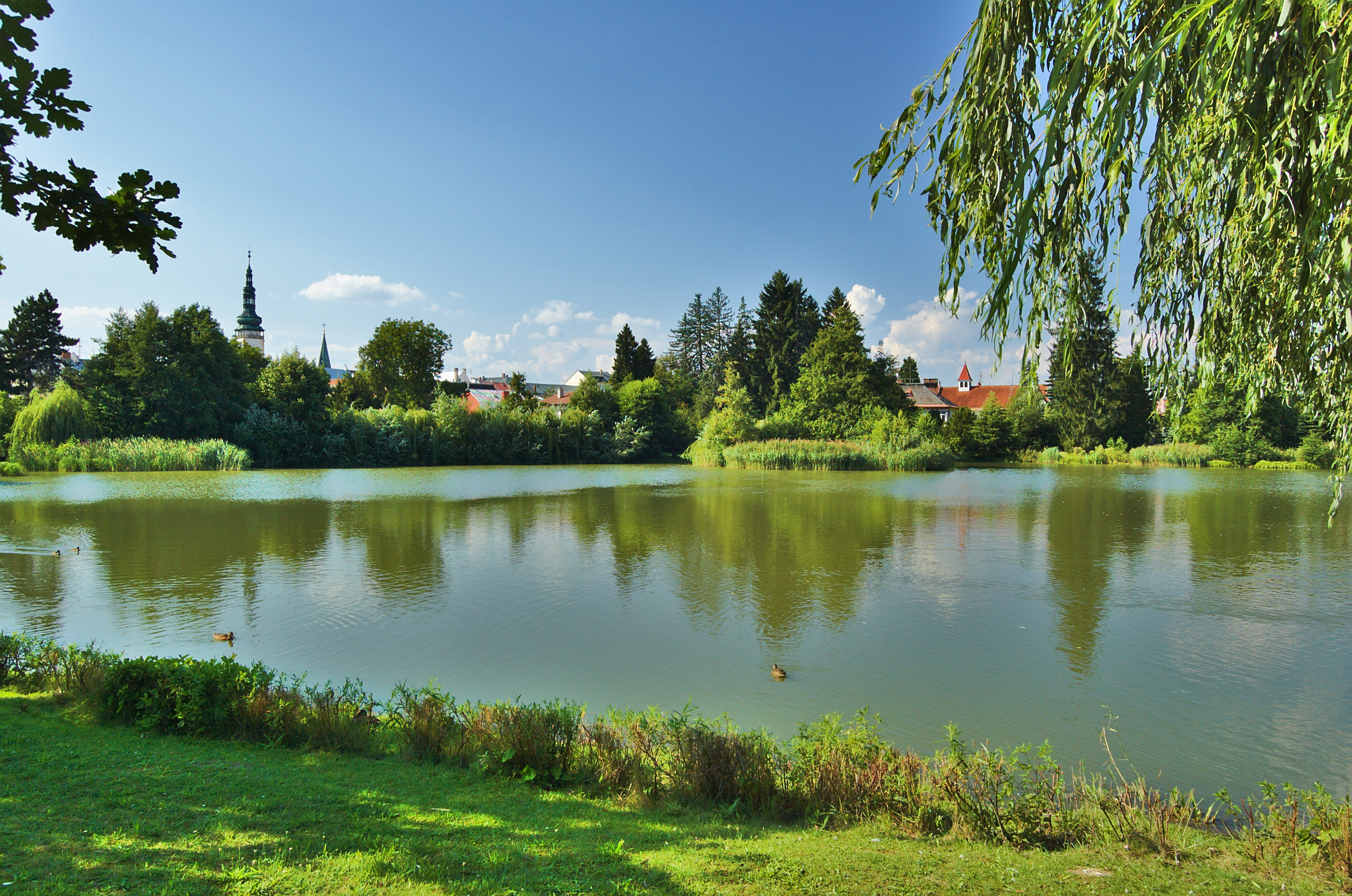 Olomoucký rybník, Litovel, okres Olomouc